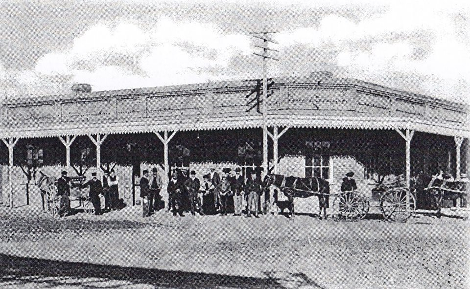 Compañía Mercantil del Chubut, suc. Trelew ca.1910